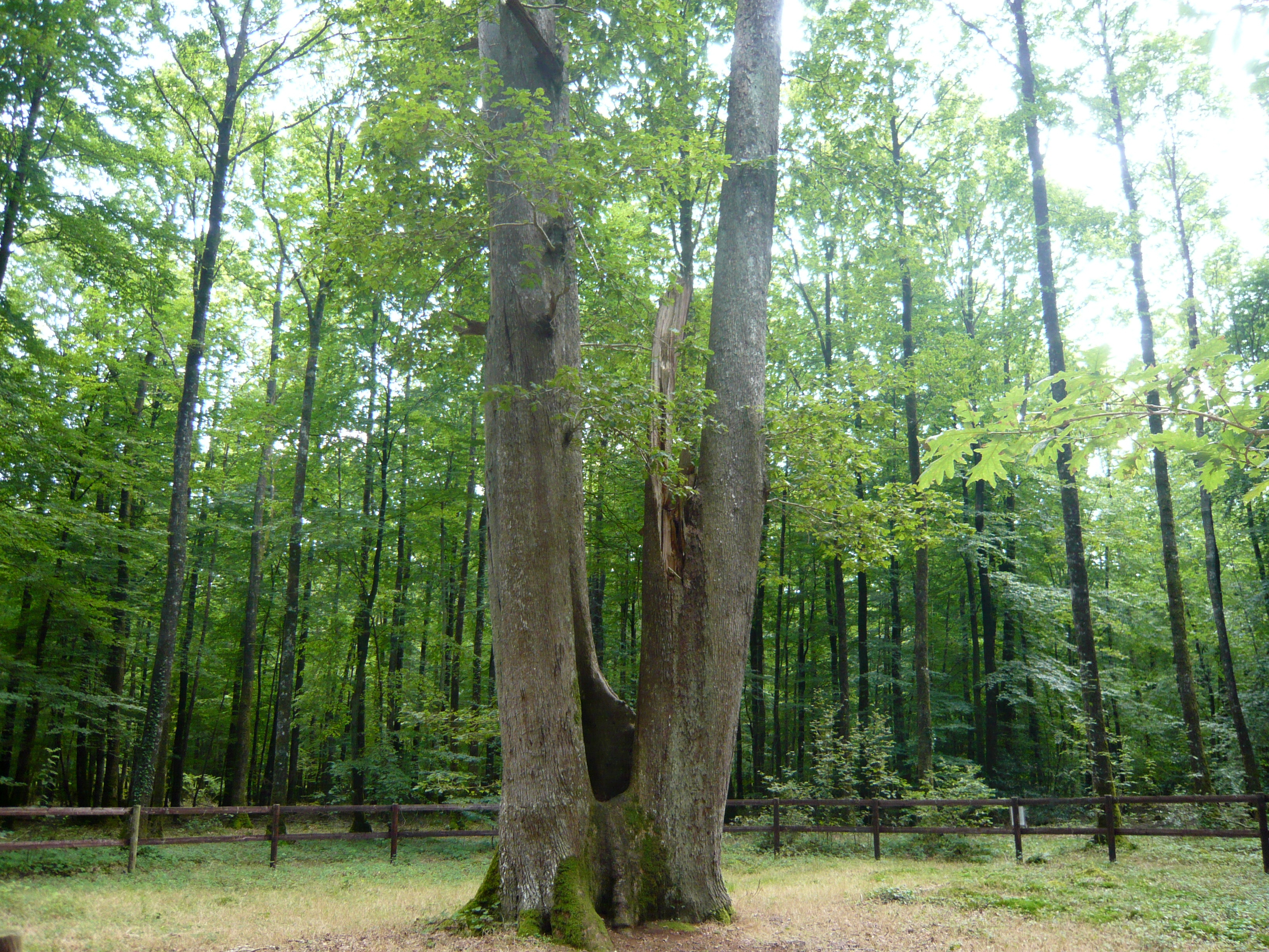 Le Chêne Fauteuil, rond de Condé, forêt de Senonches, Eure-et-Loir (France).